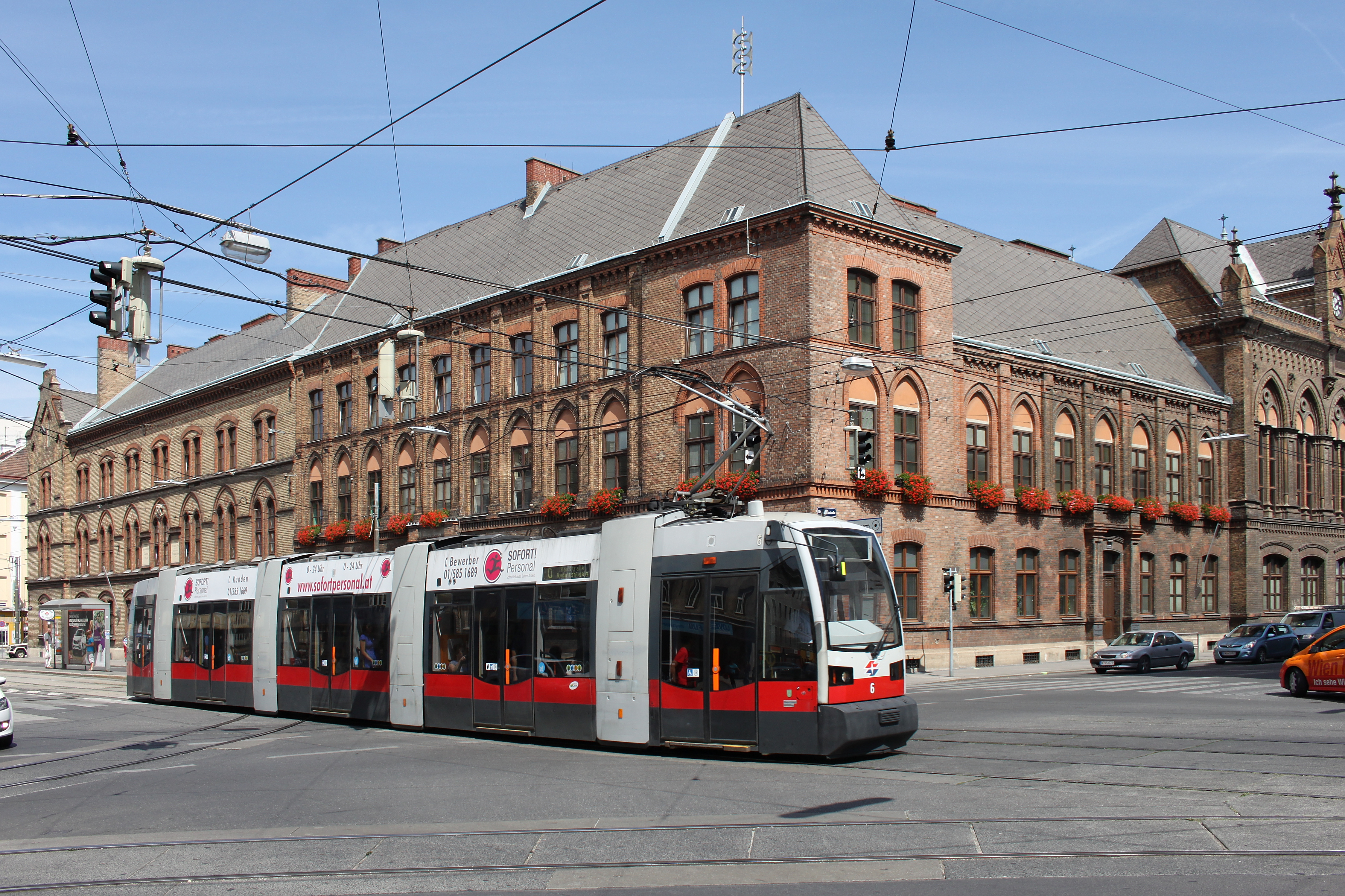 Bezirksamt